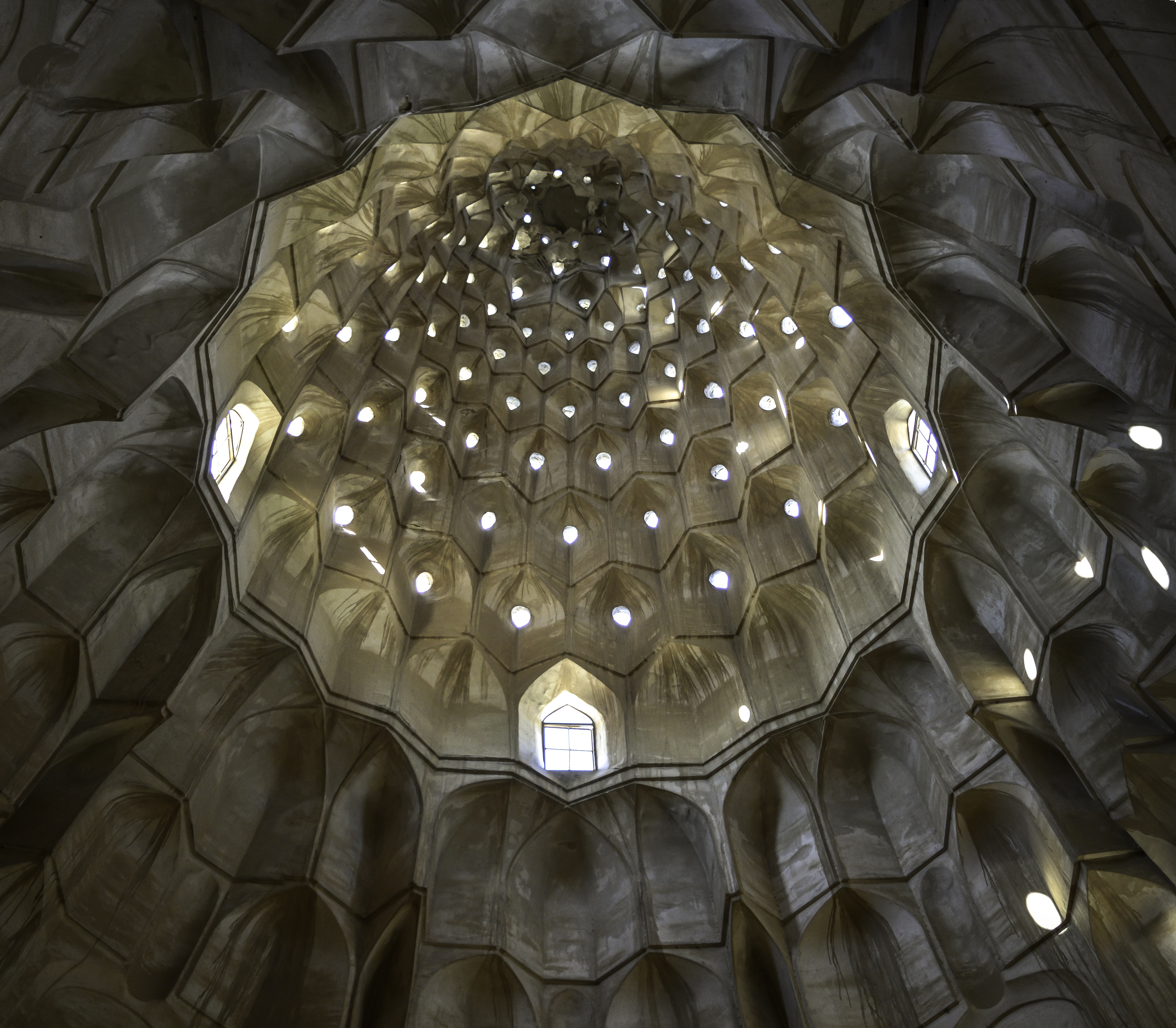 زمرد خاتون، التي كانت والدة الخليفة الناصر لدين الله وزوجة المستضئ بالله أم عمر الله والمتوفاة العام 599هـ/ 1202م.